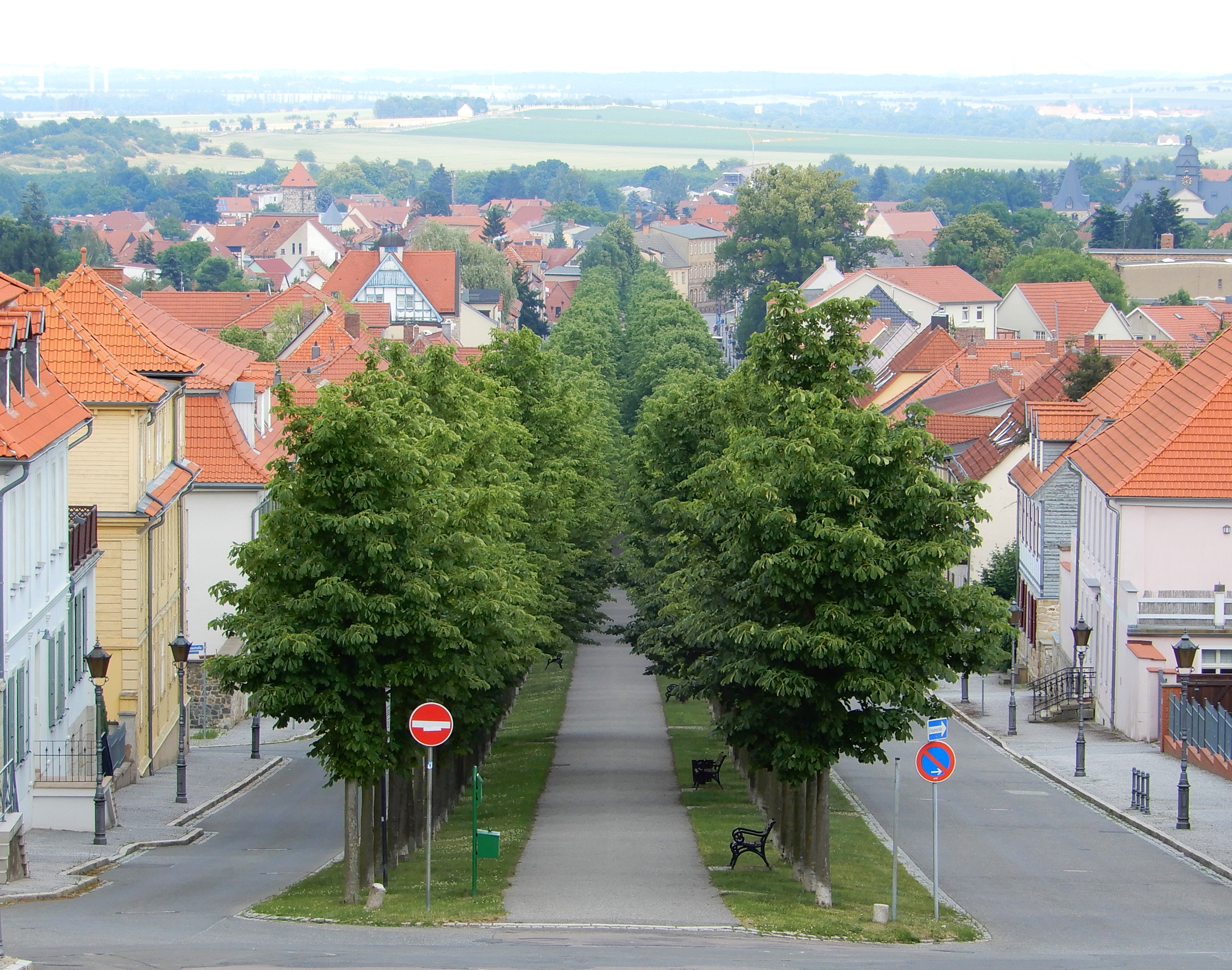 Die denkmalgeschützte Allee in Ballenstedt